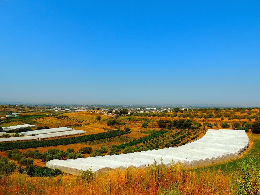 Shqip